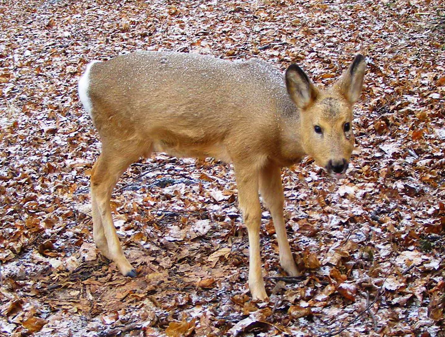 Косуля сибирская